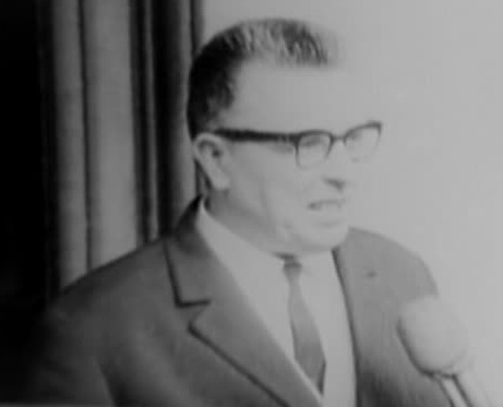 Čestmír Císař byl český a československý politik Komunistické strany Československa, ministr školství vlády ČSSR, poúnorový poslanec Národního shromáždění ČSSR, diplomat, předseda České národní rady a poslanec Sněmovny národů Federálního shromáždění na přelomu 60. a 70. let.